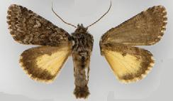 Lasionycta secedens secedens male